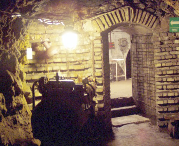 Mine, museum, Chrustenice, Czech Republic. Chrustenická šachta